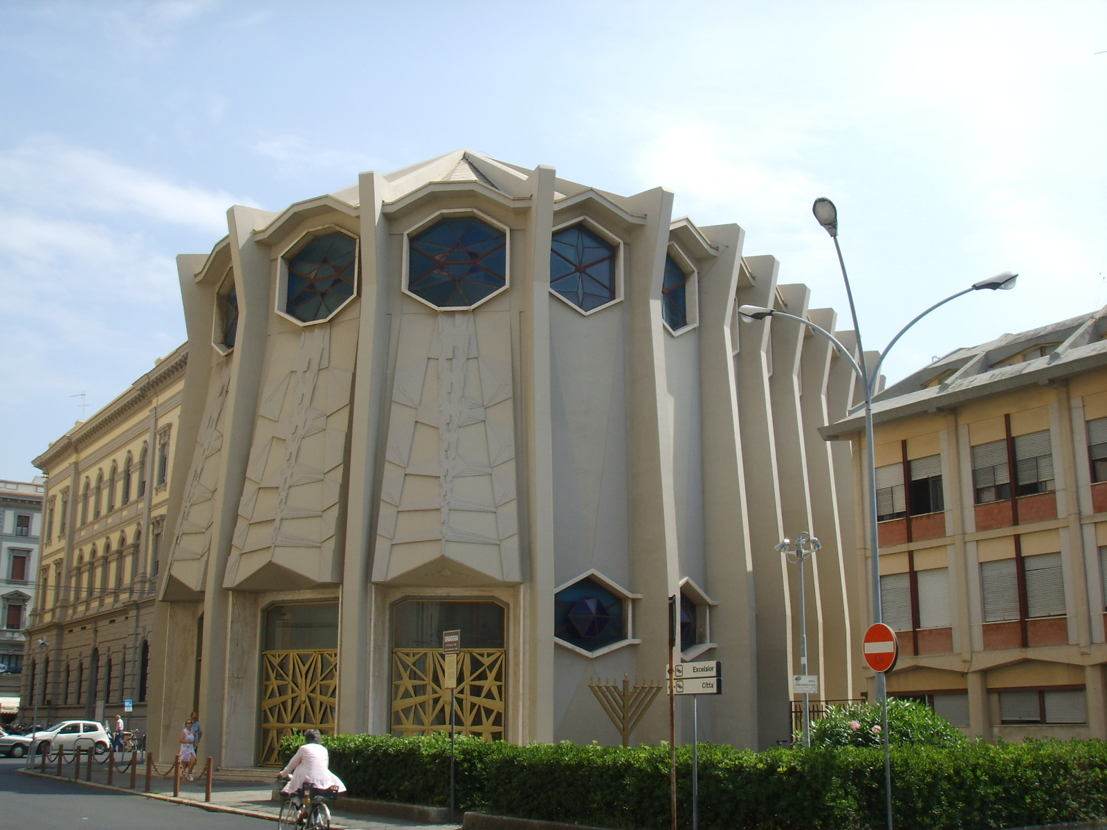 Edificio di livorno